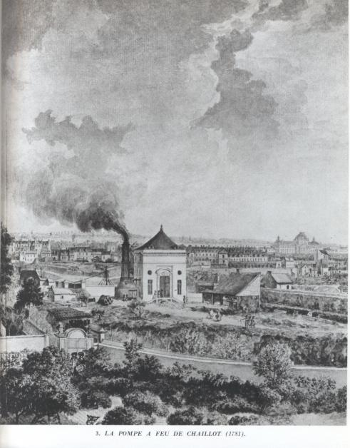 Pompe à feu de Chaillot, sur l'emplacement de l'actuelle rue des Frères Périer, dans le XVIe arrondissement de Paris. Cette pompe, actionné par la vapeur, servait à alimenter les Réservoirs de Passy, situé sur la Colline de Chaillot, près de la place de l'Étoile.